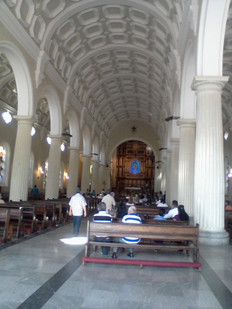 Basílica La Consolación de Tariba